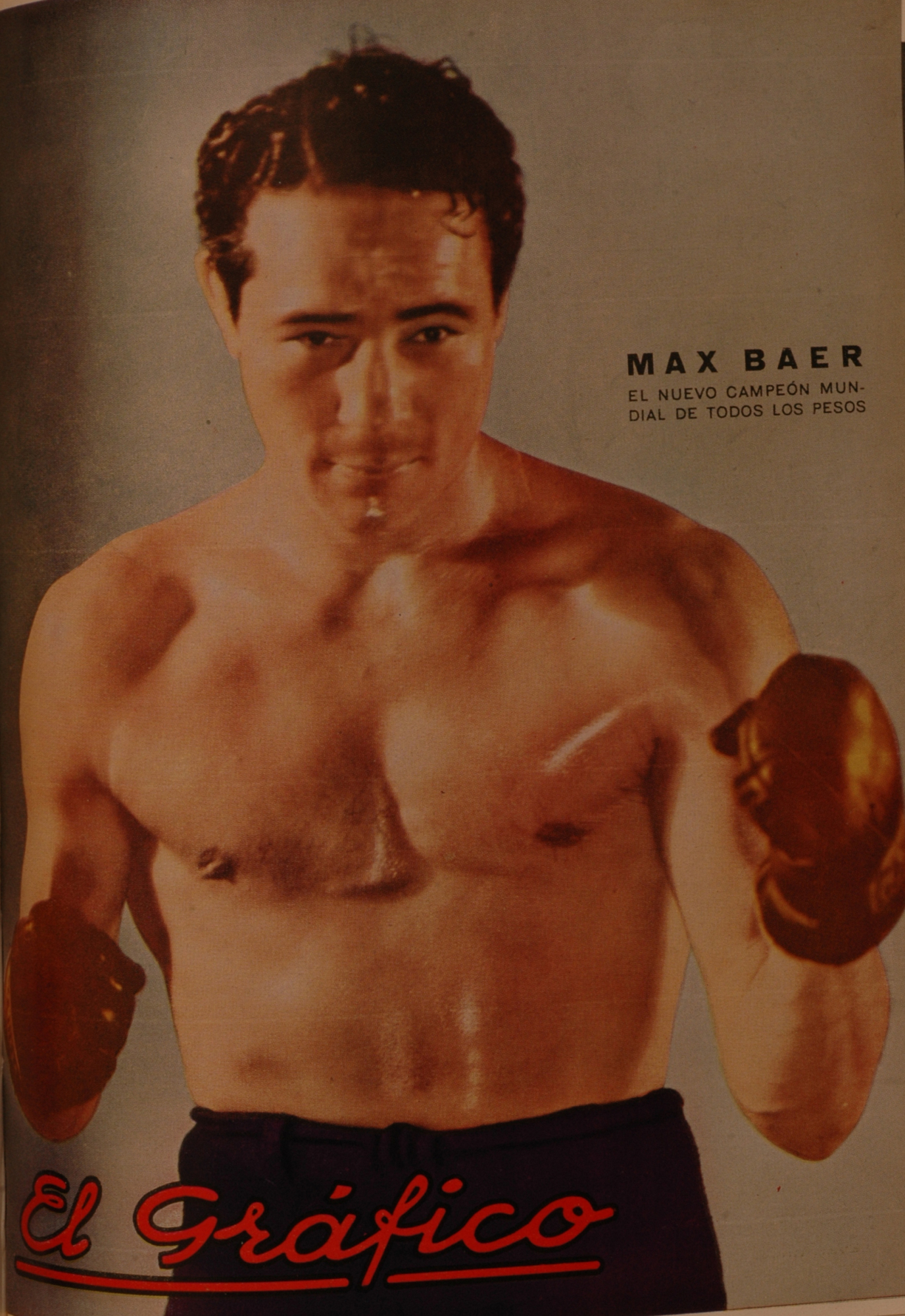 El Grafico del 07 de Julio de 1934. Edicion 782